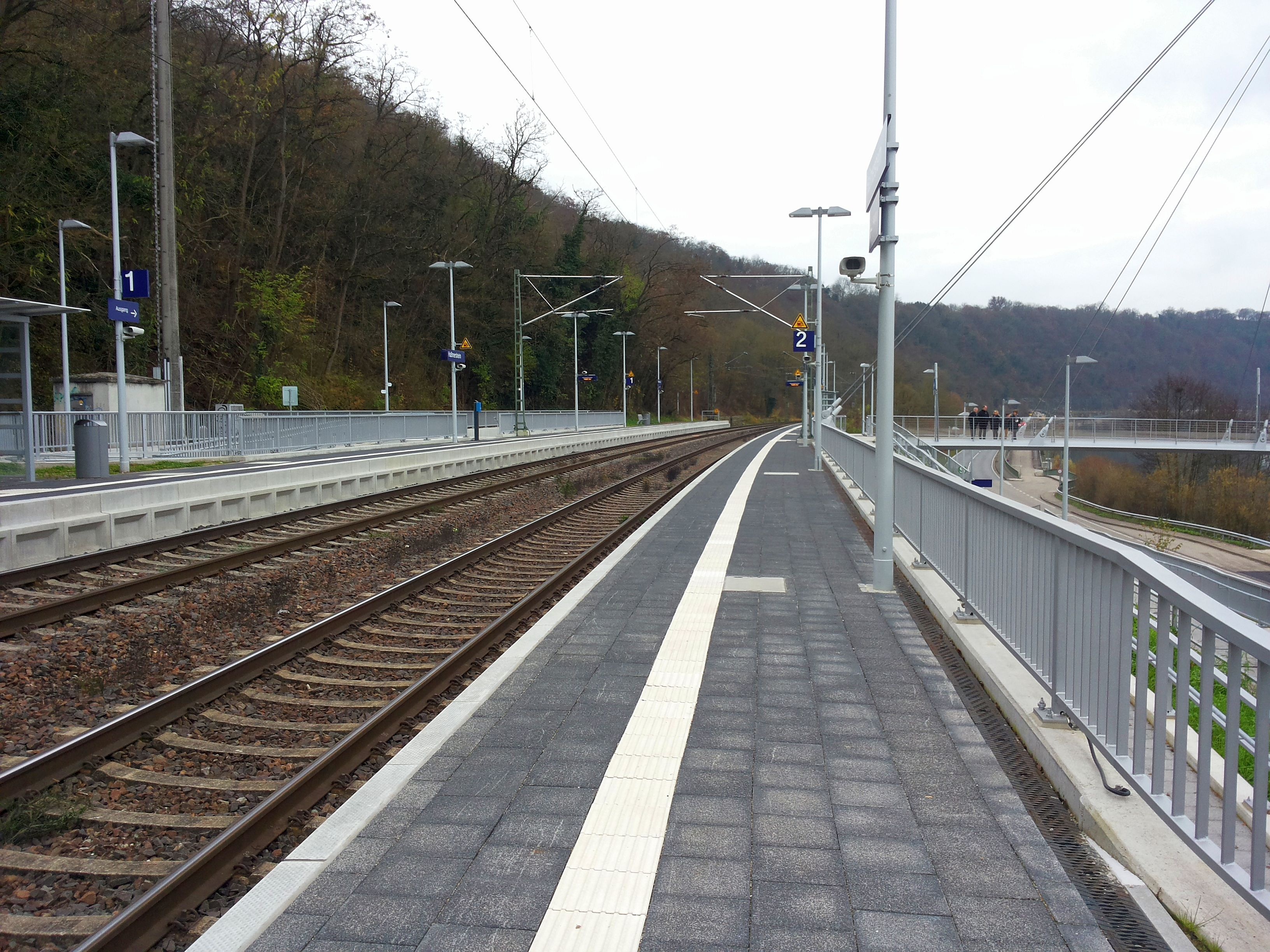 Zughaltestelle Haßmersheim, rechts im Bild der Neckarsteg